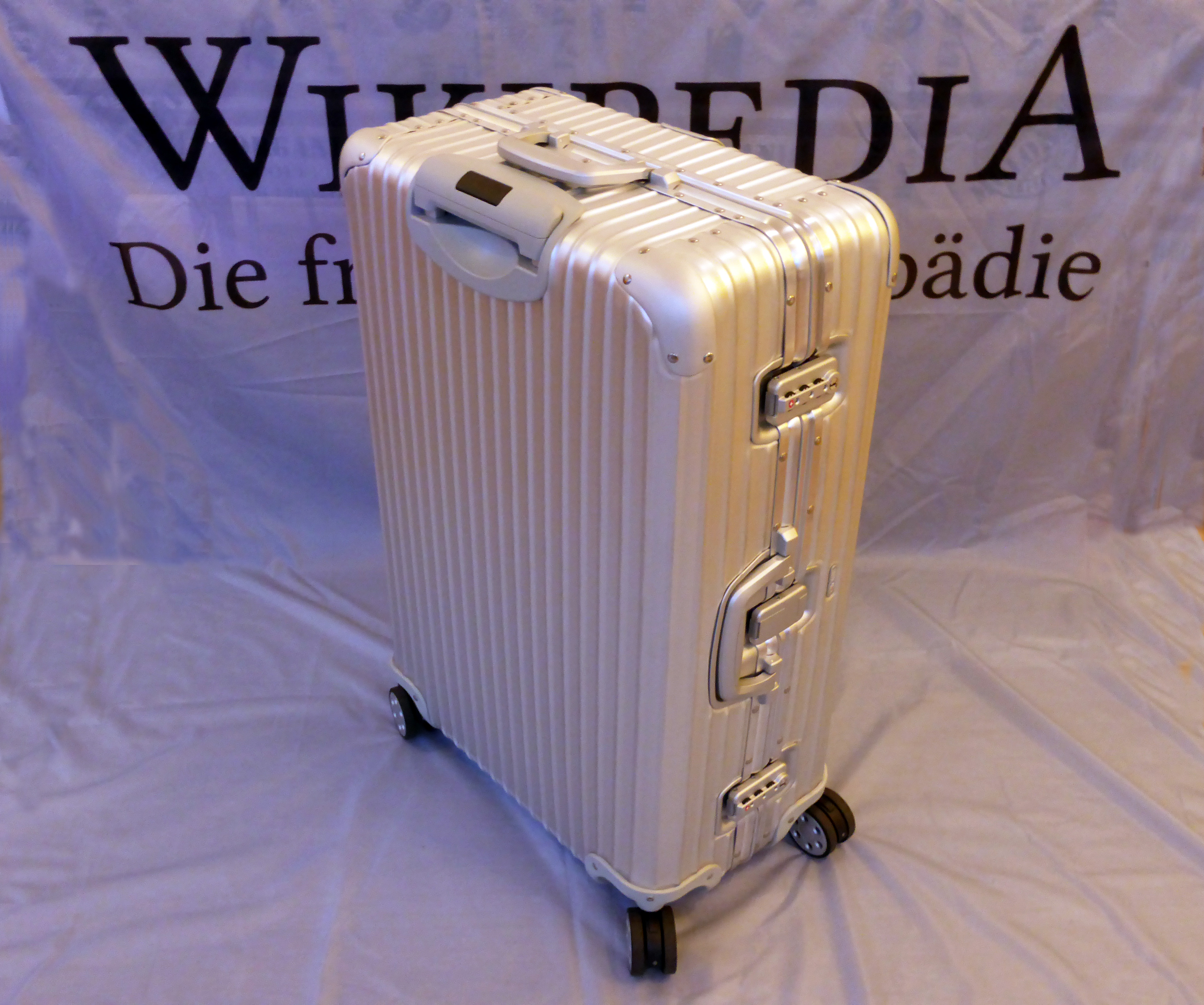 Rimowa-Koffer der Topas-Serie.